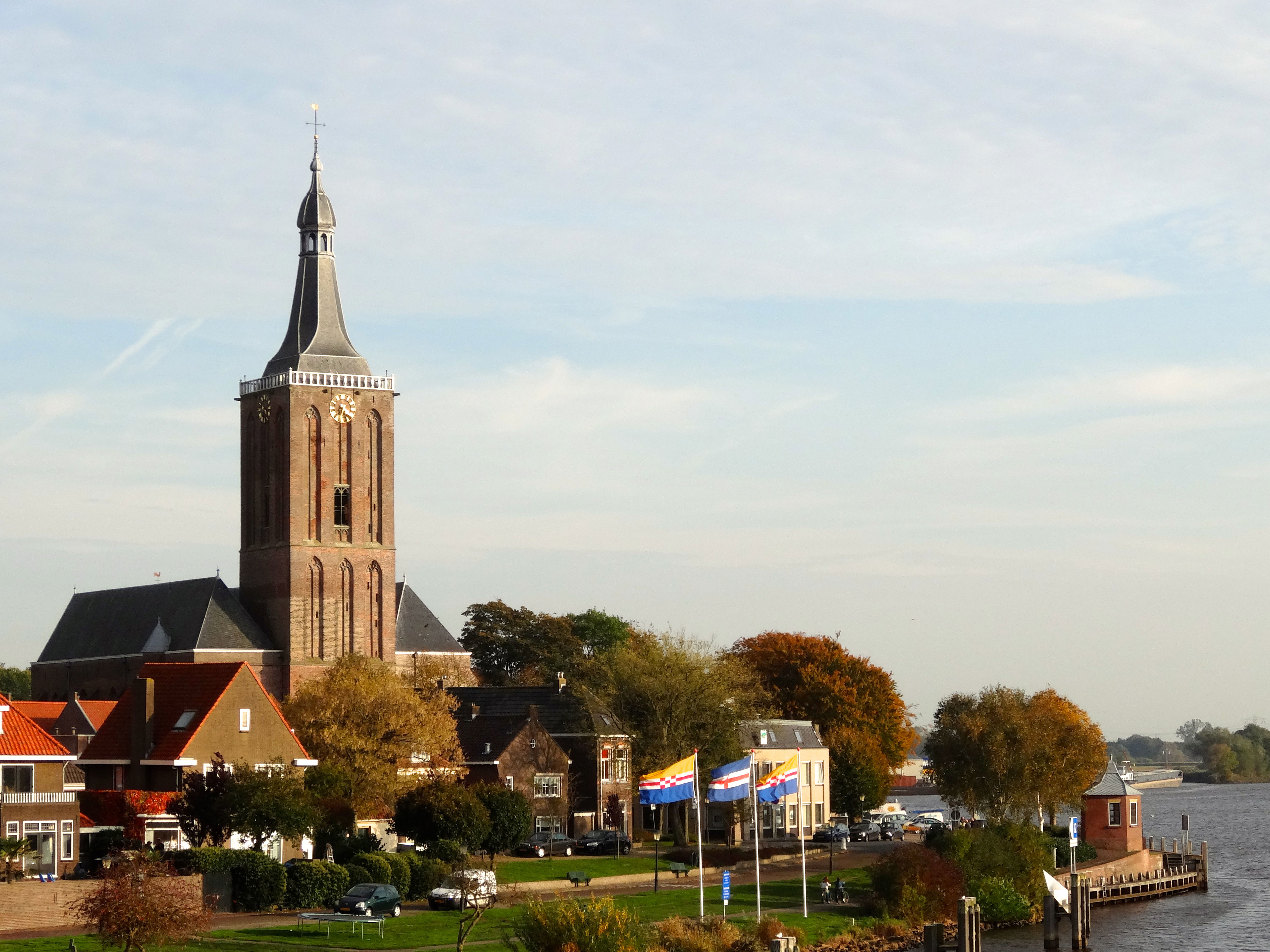 Zicht op Hasselt met de Grote of Sint Stephanuskerk